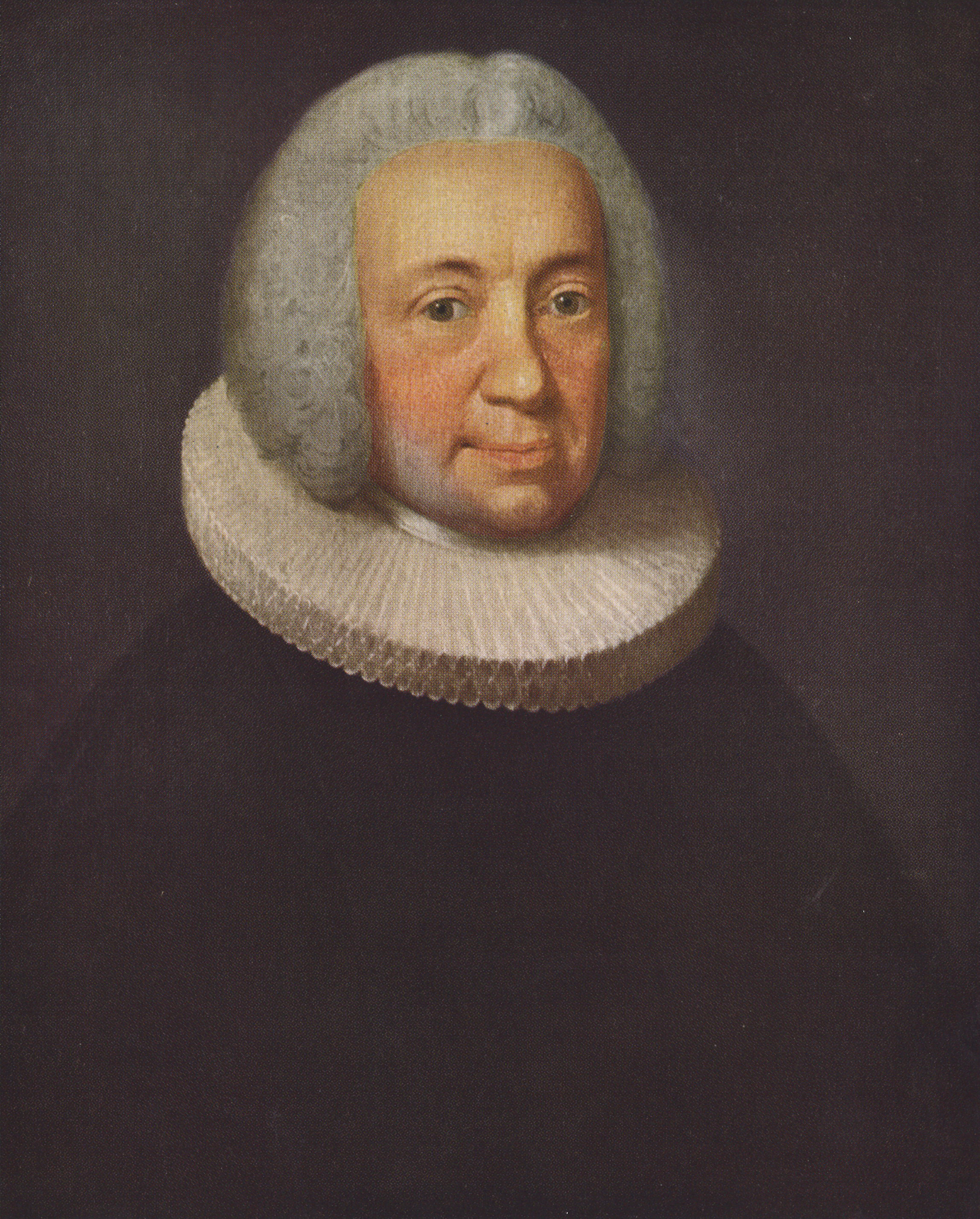 Hans Adolph Brorson (1694-1764), Danish bishop and hymn writer.label QS:Lru,"Ганс Адольф Брорсон (датский: Hans Adolph Brorson; 1694—1764) — датский религиозный поэт; епископ." label QS:Lsv,"Hans Adolph Brorson (1694-1764), dansk biskop och psalmförfattare." label QS:Len,"Hans Adolph Brorson (1694-1764), Danish bishop and hymn writer."